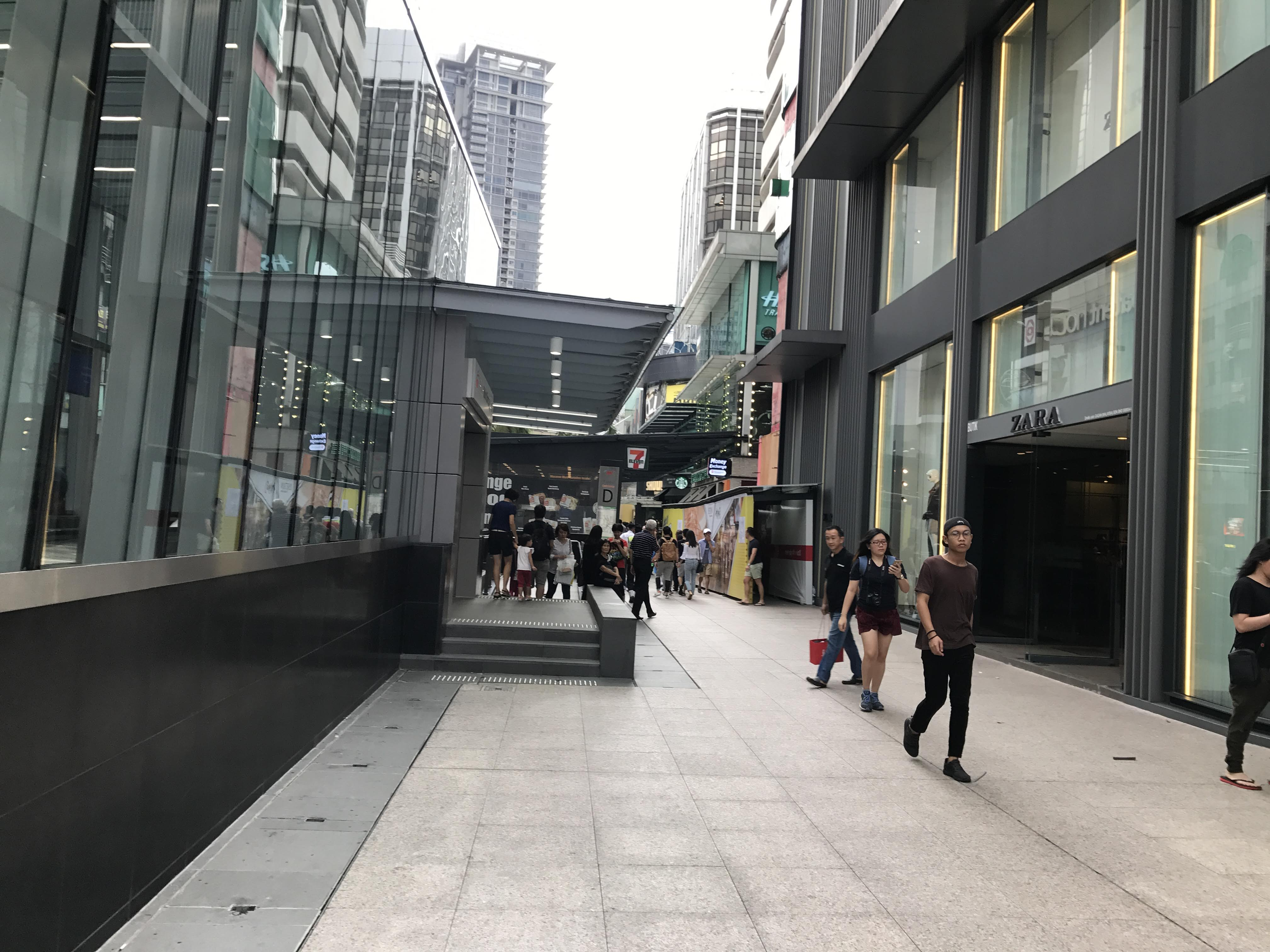 樂天廣場鄰近捷運加影線出口